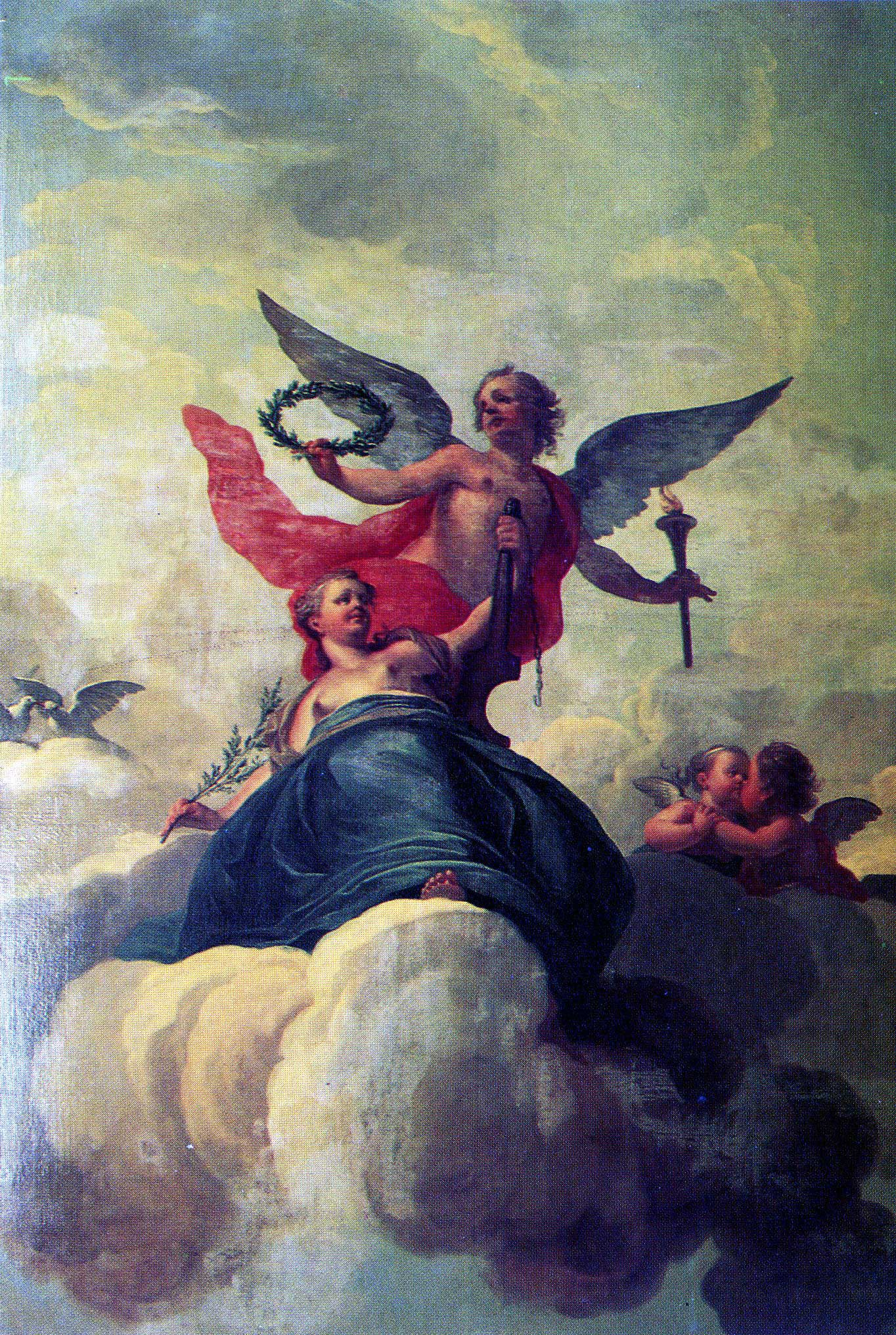 "De overheid" (plafondschildering in het huis van burgemeester Willem van Strijen (1687-1765) Westhaven 52 te Gouda